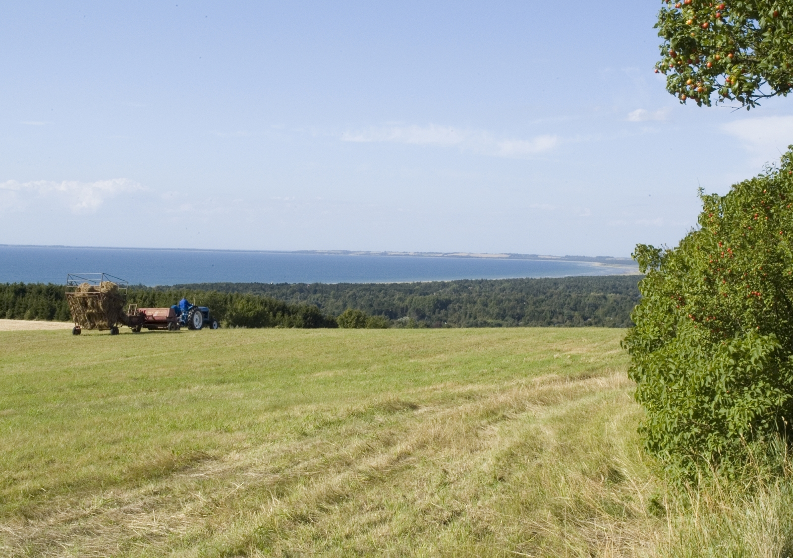 Sejerø Bugten